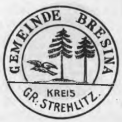 Altes Siegel bzw. Stempel der Gemeinde Bresina im Kreis Groß Strehlitz.